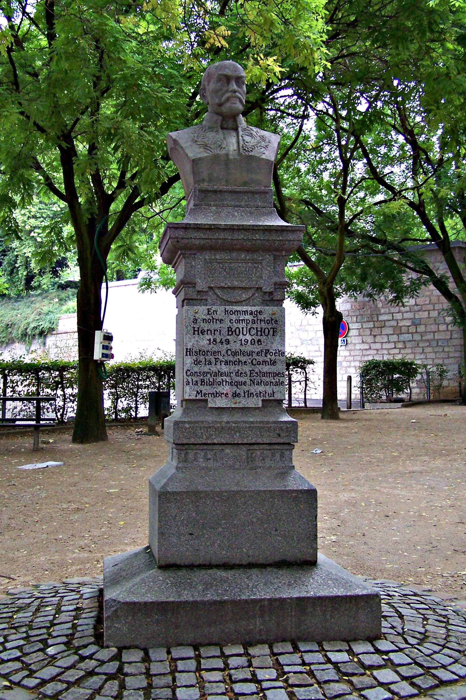 BESANÇON Buste de Henri Bouchot - Square Bouchot